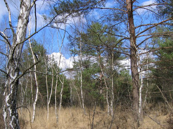 Paysage de Sologne : fenasses, pins sylvestre, bouleaux